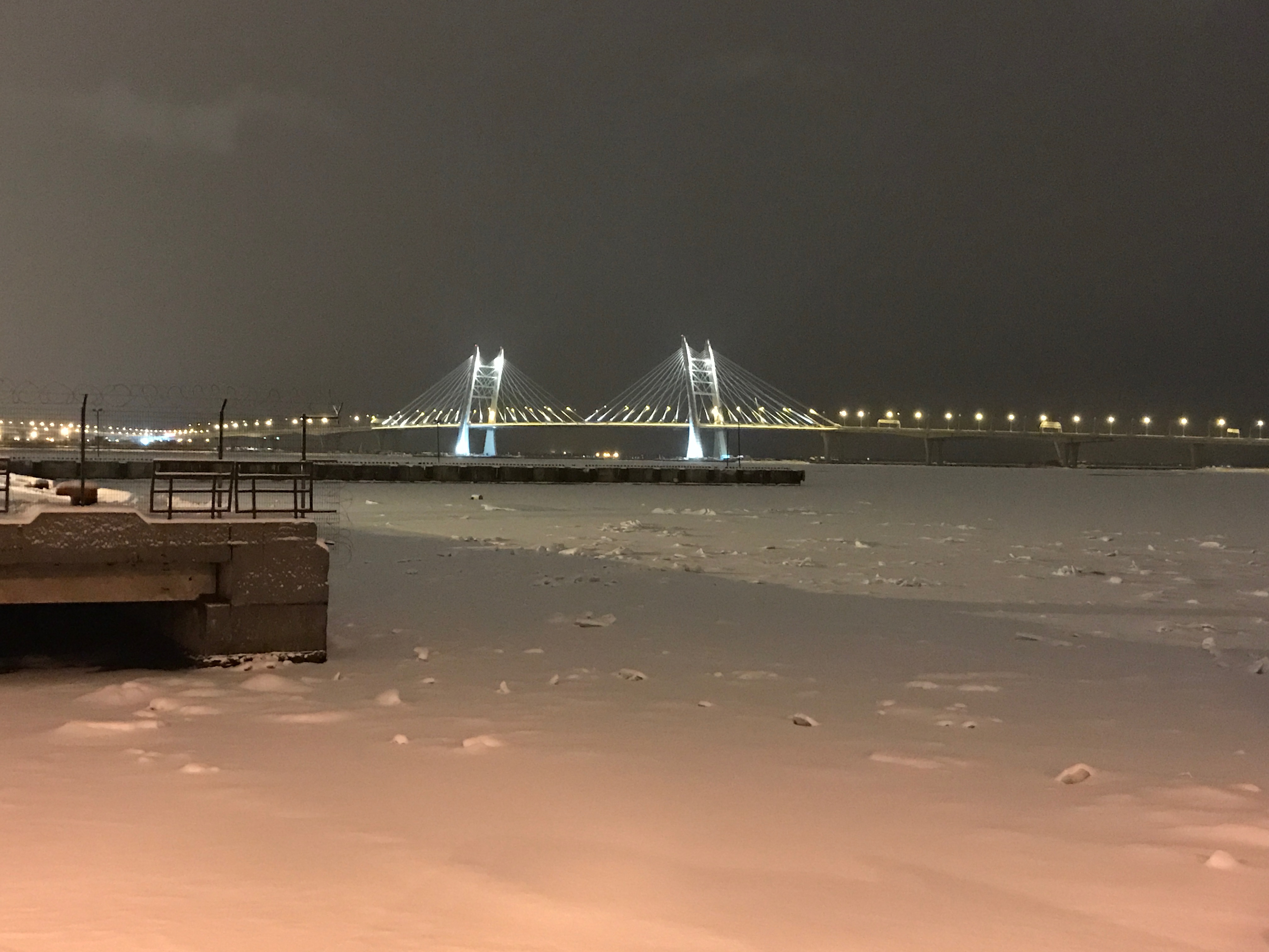 Вид на ЗСД с Васильевского острова